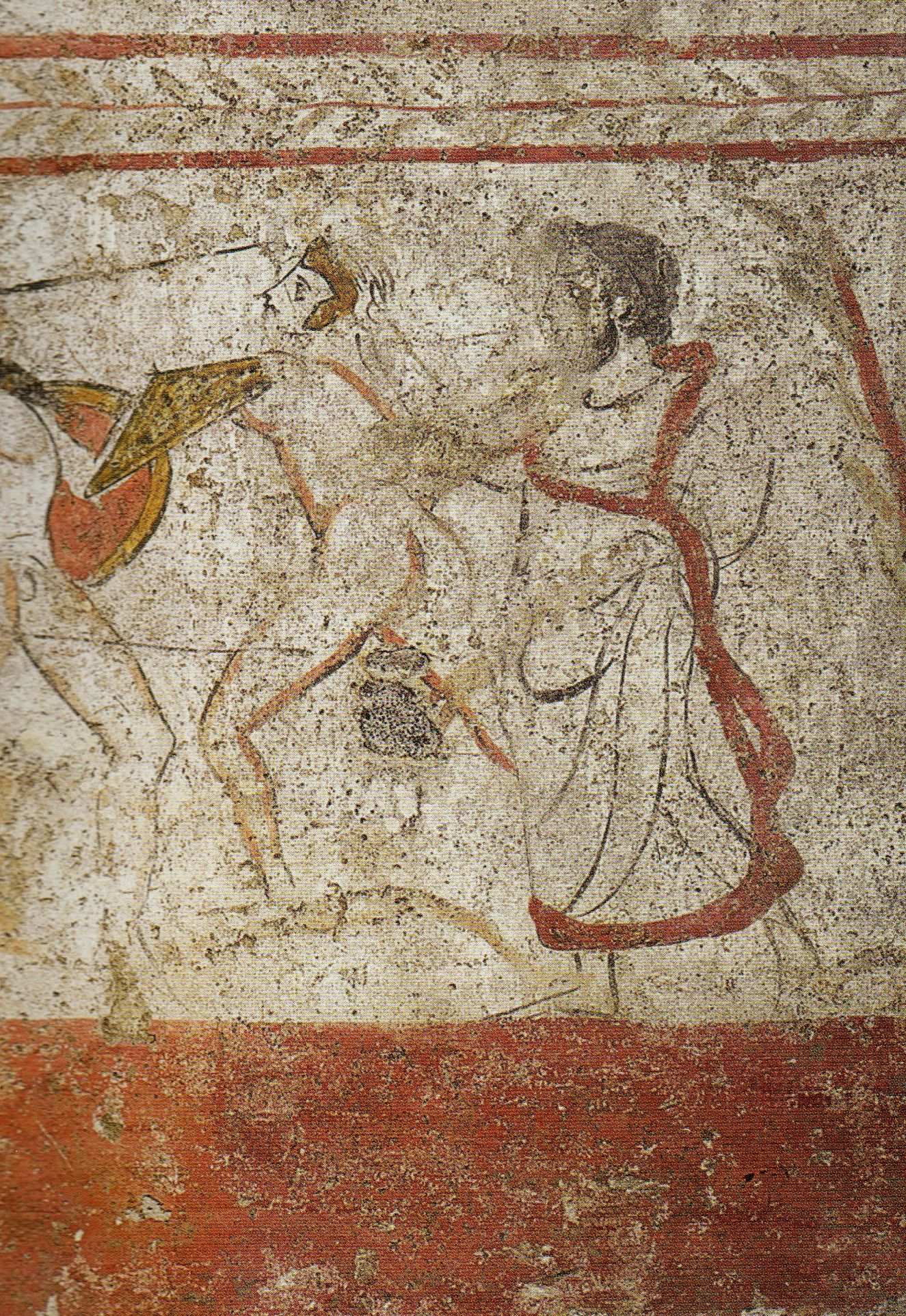 Paestum, Grab des heimkehrenden Ritters. Waffenkämpfer und Schiedsrichter, Detail einer der Längsplatten